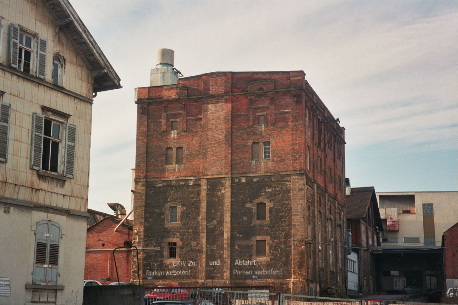 Ludwigsburg, Germany, former industrial area (Bleyle company) in Ludwigsburg-West (Weststadt) en: around 2000. The building in the foreground has been demolished meanwhile. The old factory building has been meanwhile enlarged to "Bleyle lofts". de: Ludwigsburg, Weststadt. Gebäude im Vordergrund wohl schon abgerissen. Altes Fabrikgebäude ist inzwischen für eine andere Nutzung umgebaut worden. Meiner Erinnerung nach war das ehemaliges Bleyle-Gelände.